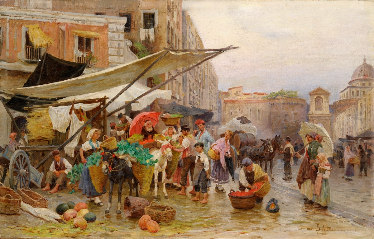 Markttag in Rom. Signiert. Öl/Lwd., 42 x 65 cm